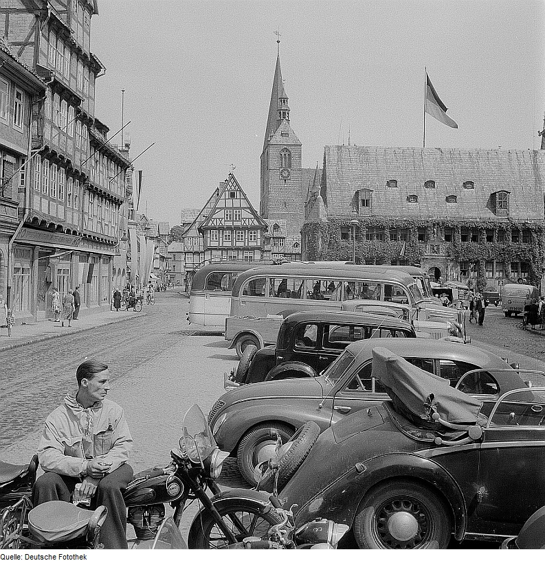 Original image description from the Deutsche Fotothek Quedlinburg. West- und Nordseite des Marktplatzes mit Rathaus und Türmen der Benediktinerkirche